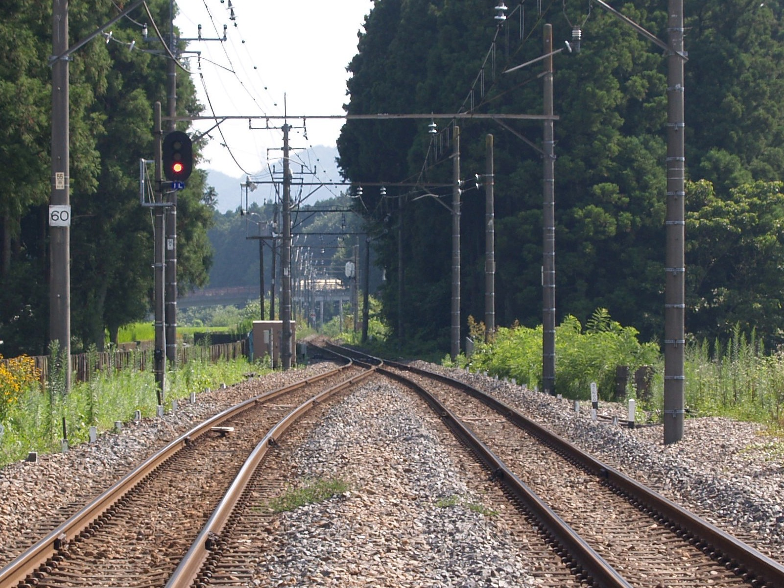 鬼怒立岩信号所（鬼怒川温泉方の踏切から撮影）